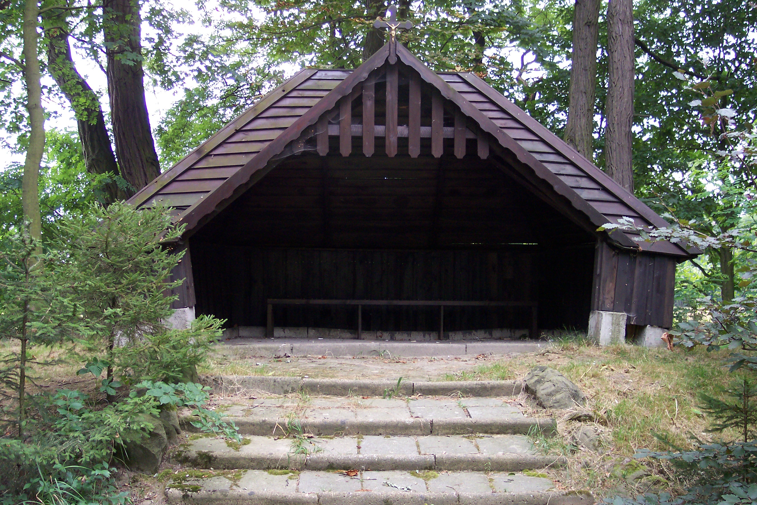 Grota w Rachowicach